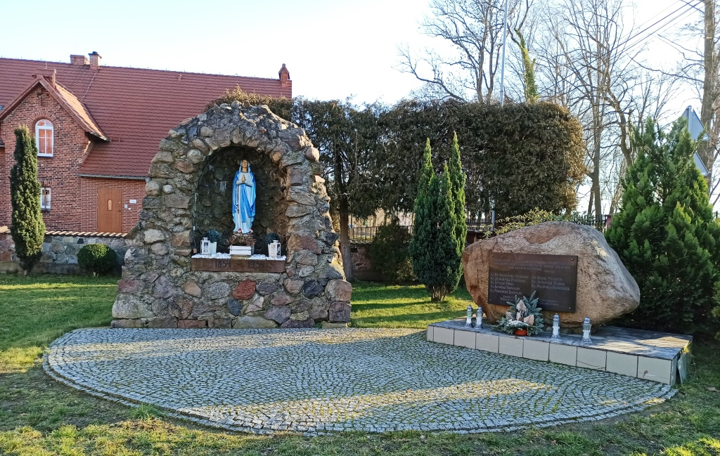 Trzemeszno Lubuskie kapliczka przy kościele, 2020 rok